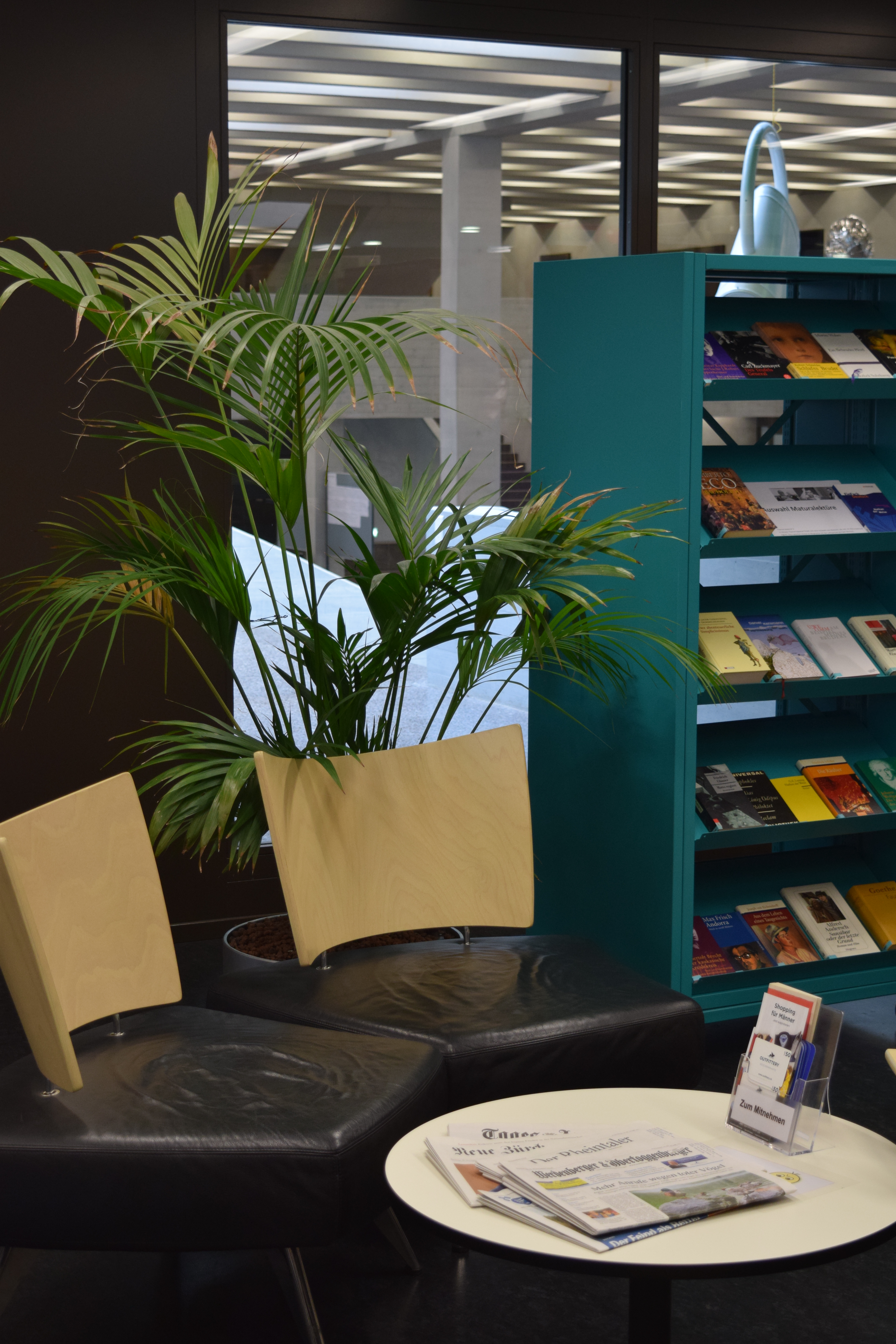 Sitzecke